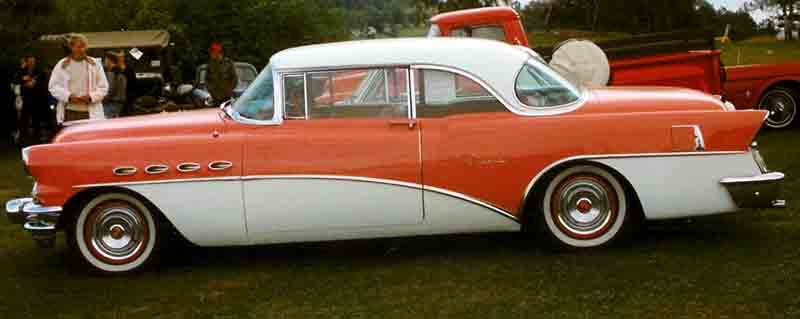 1956 Buick Super Riviera Series 50 Model 56R 2-door Hardtop